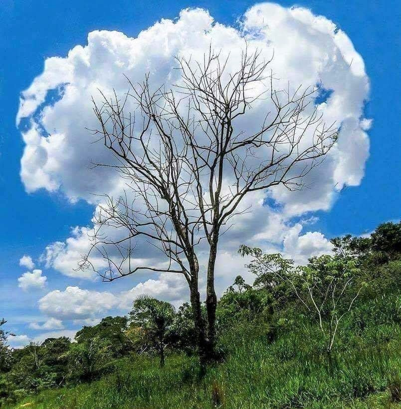 La maravilla de la naturaleza en un pueblo encantado como Briceño